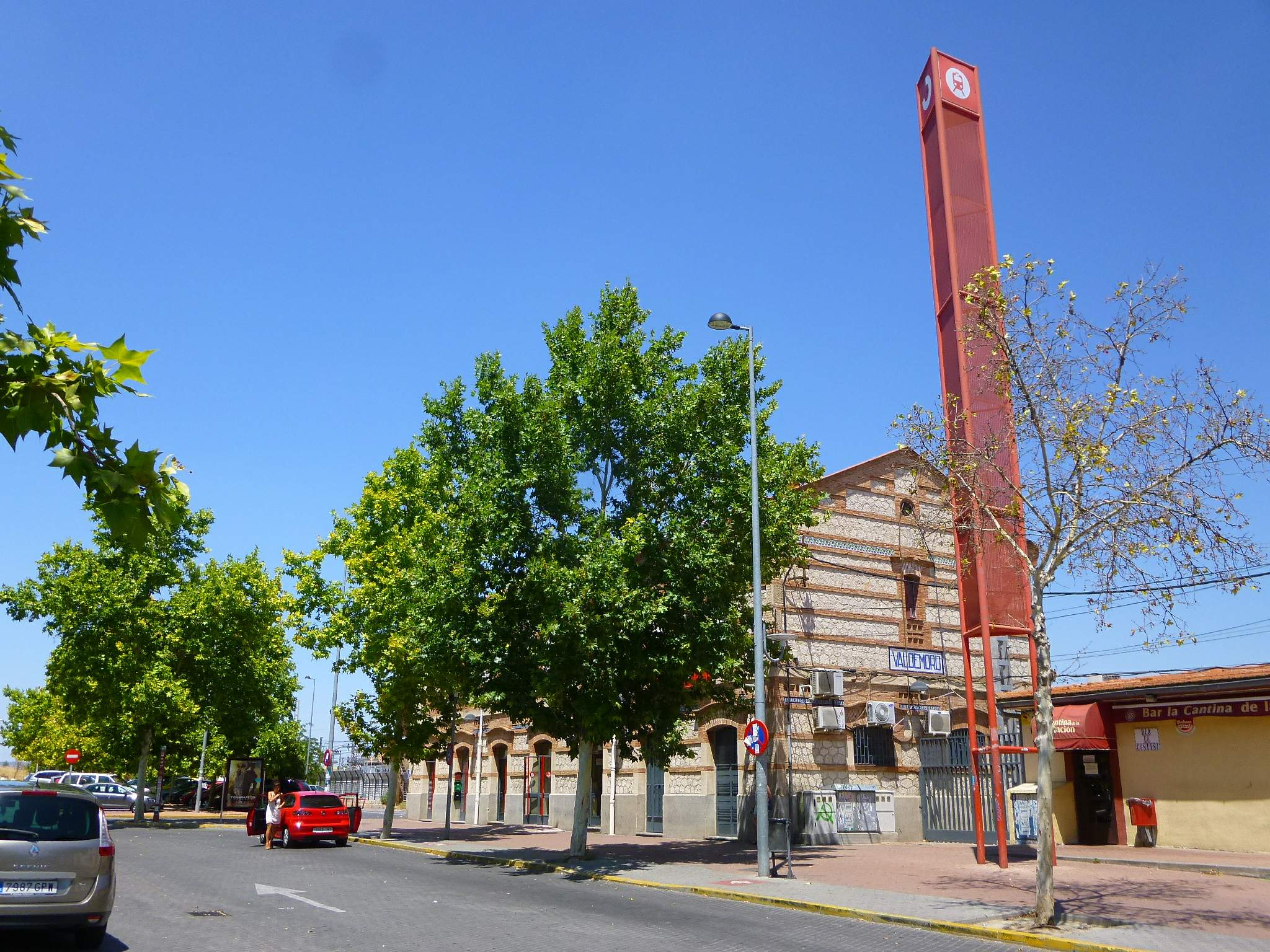 Estacion de tren de Valdemoro (Madrid)